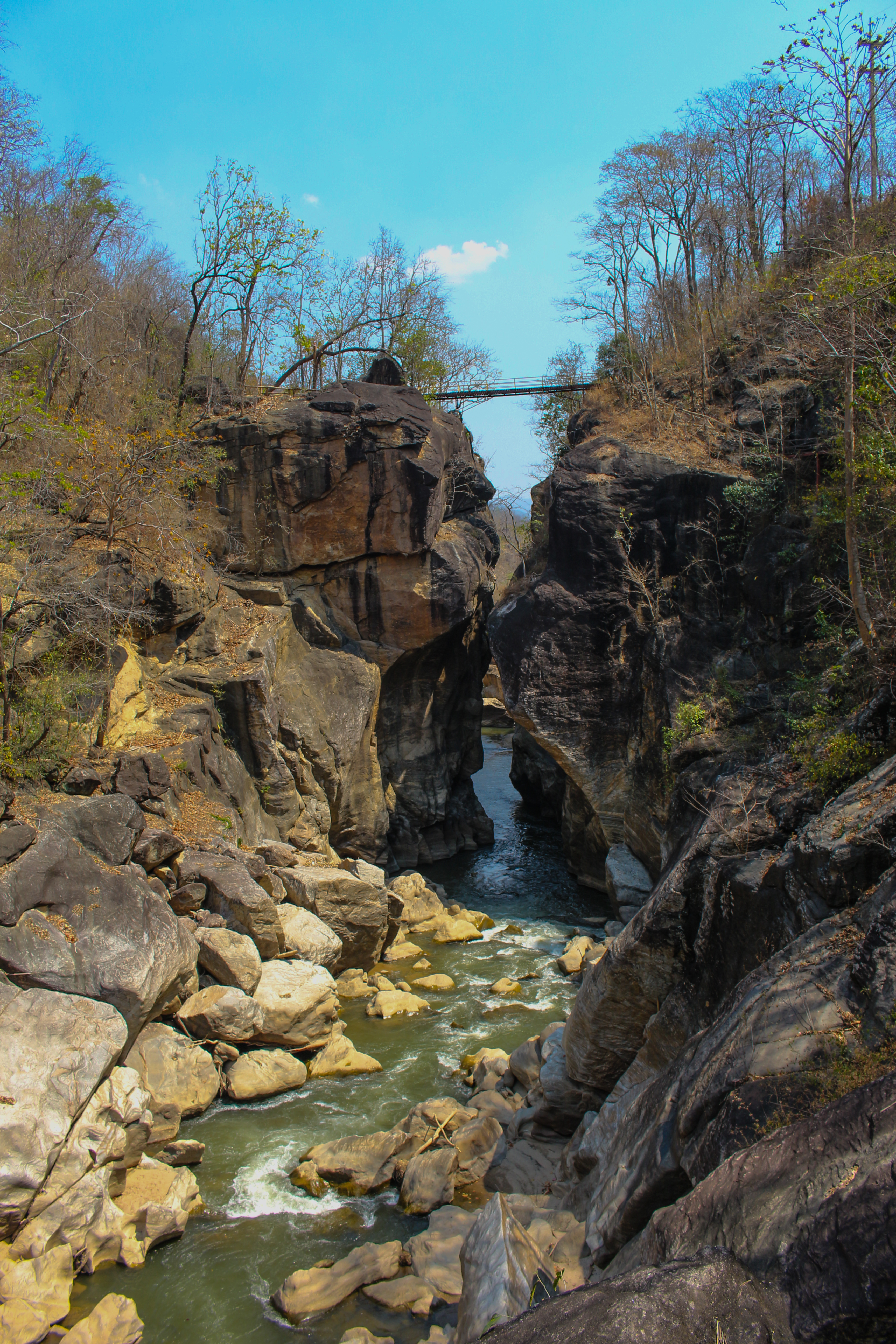 อุทยานแห่งชาติออบหลวง มีพื้นที่ครอบคลุมอยู่ในท้องที่อำเภอจอมทอง อำเภอฮอด และอำเภอแม่แจ่ม จังหวัดเชียงใหม่ เป็นสถานที่น่าเที่ยวที่มีลักษณะช่องแคบเขาขาดที่มีหน้าผาหินขนาบลำน้ำ ทำให้เกิดหุบผาลึก นอกจากนั้นภายในบริเวณอุทยานฯ ยังมีการขุดค้นพบแหล่งโบราณคดียุคก่อนประวัติศาสตร์